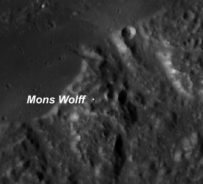 Mons Wolff. (Imagen LRO)